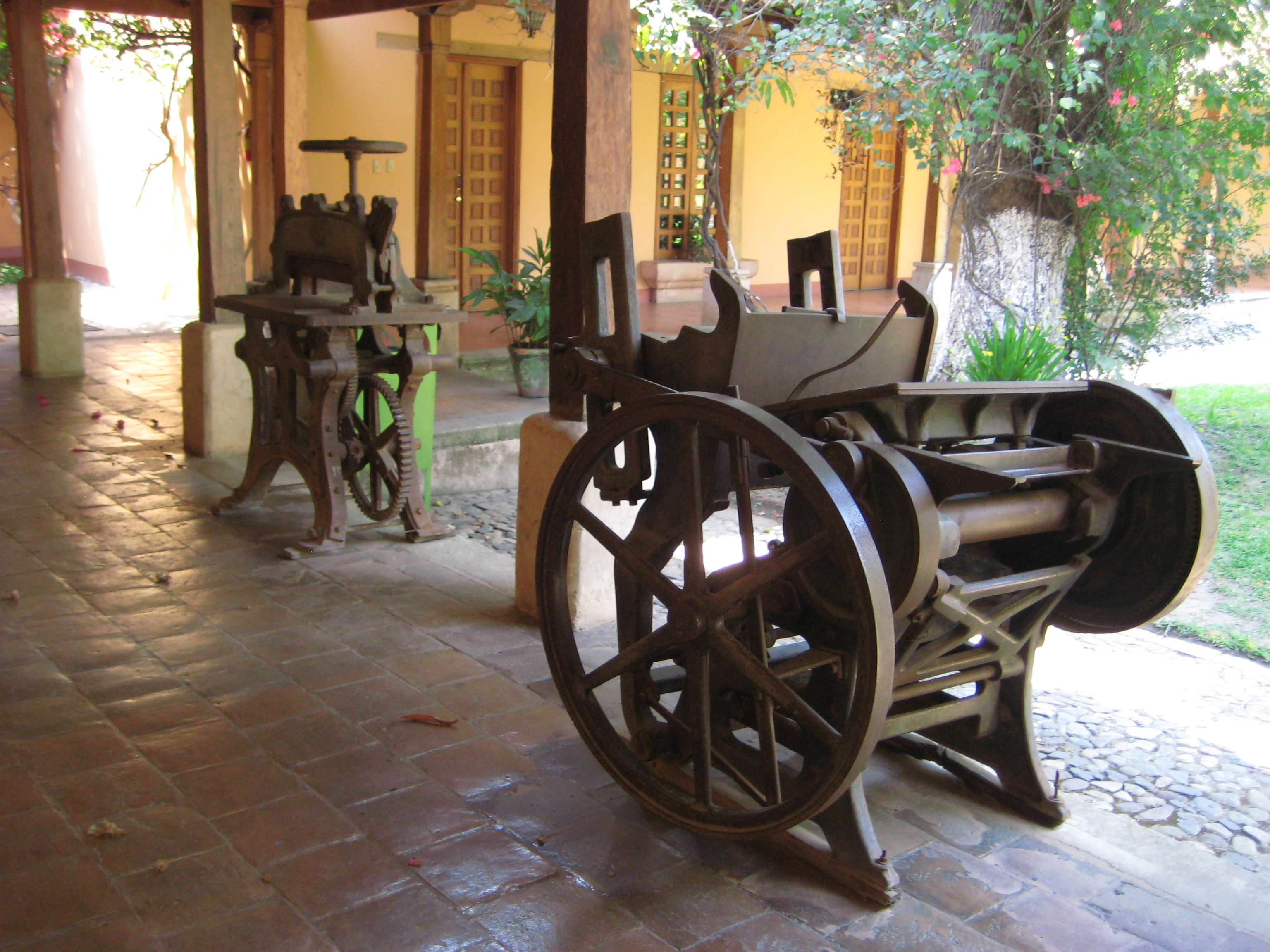 Comayagua Colonial Museum